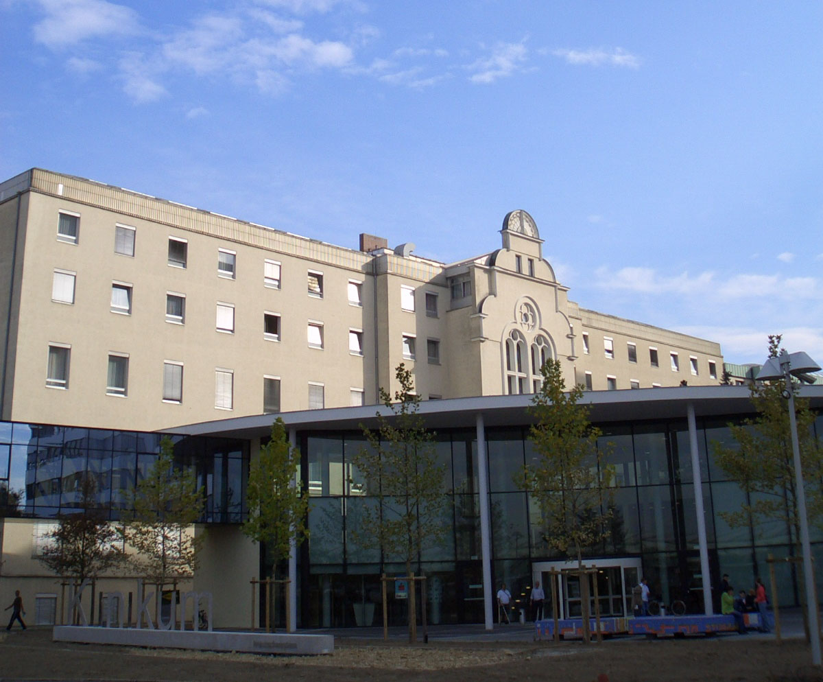 Eingangsbereich des Allgemeinen Krankenhaus Wels